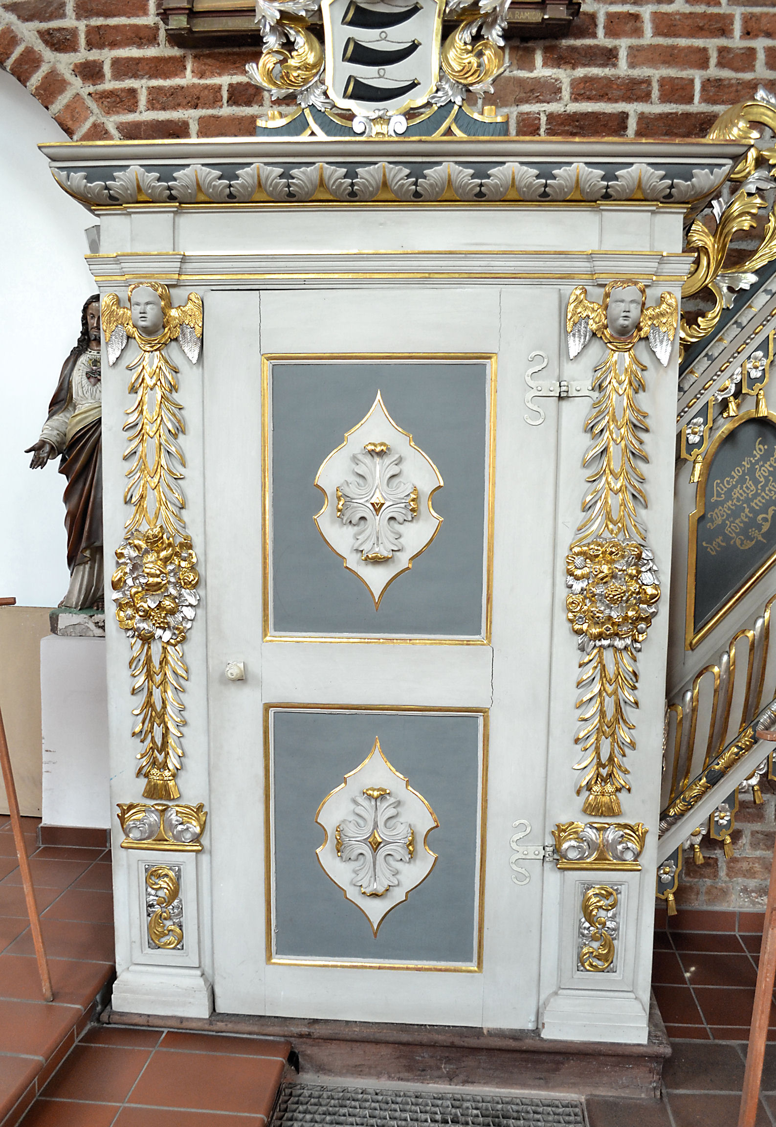 Marianowo - zespół klasztorny cystersów